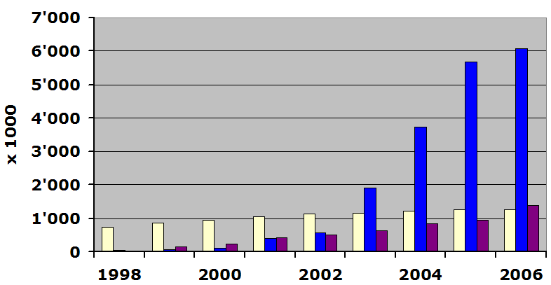 Nombre d'abonnés au réseau fixe (jaune), mobile (bleu) et d'utilisateurs internet (rouge) en Tunisie (1998-2006). Number of fixed lines (yellow), mobile phone subscribers (blue) and internet users in Tunisia (1998-2006).